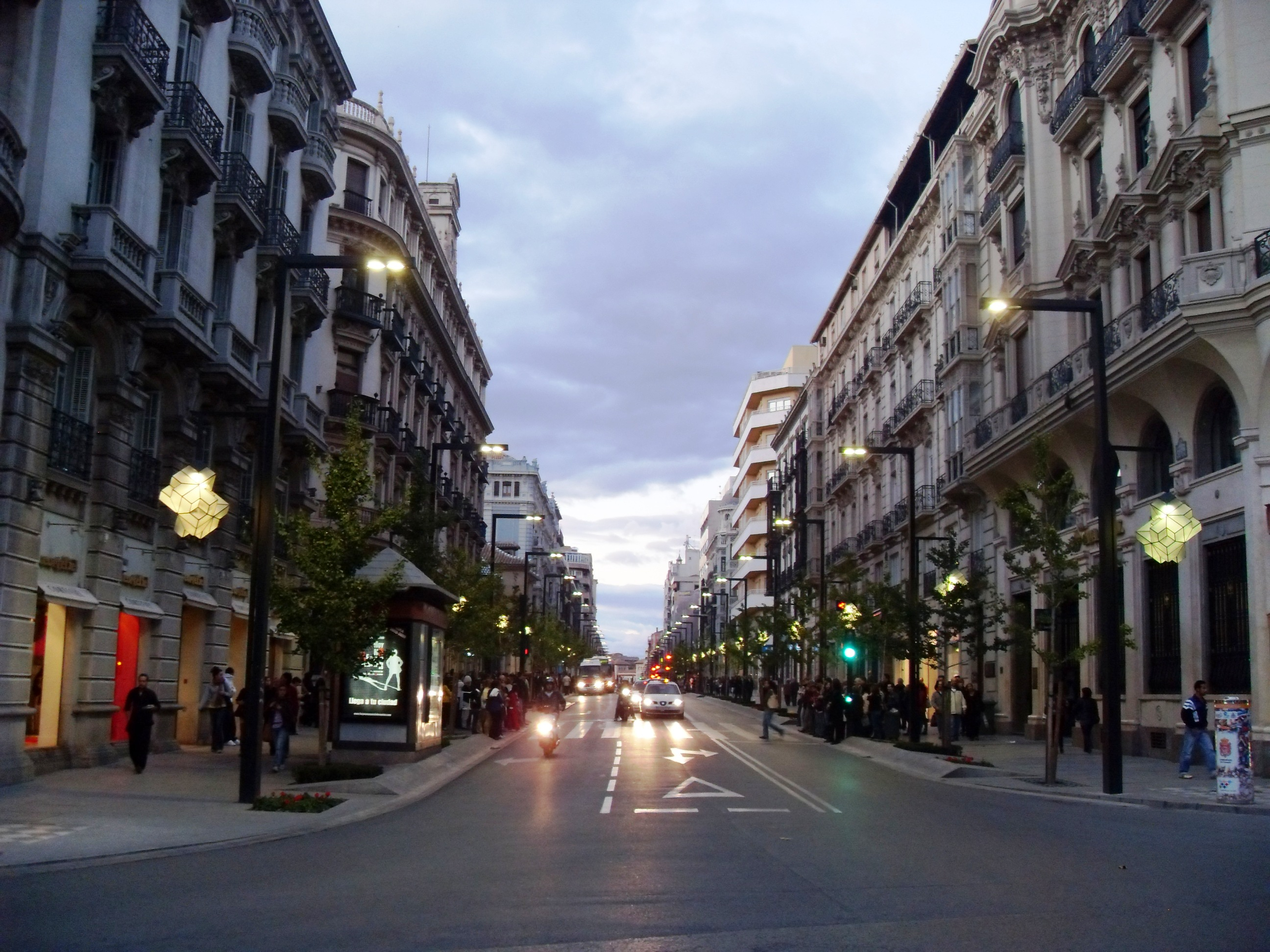 VLUU L200 / Samsung L200 Esta calle esta bien pipiris, jaja, y Fermín me hizo notar las lámparas!